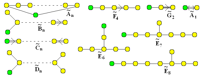 Affine Dynkin diagram